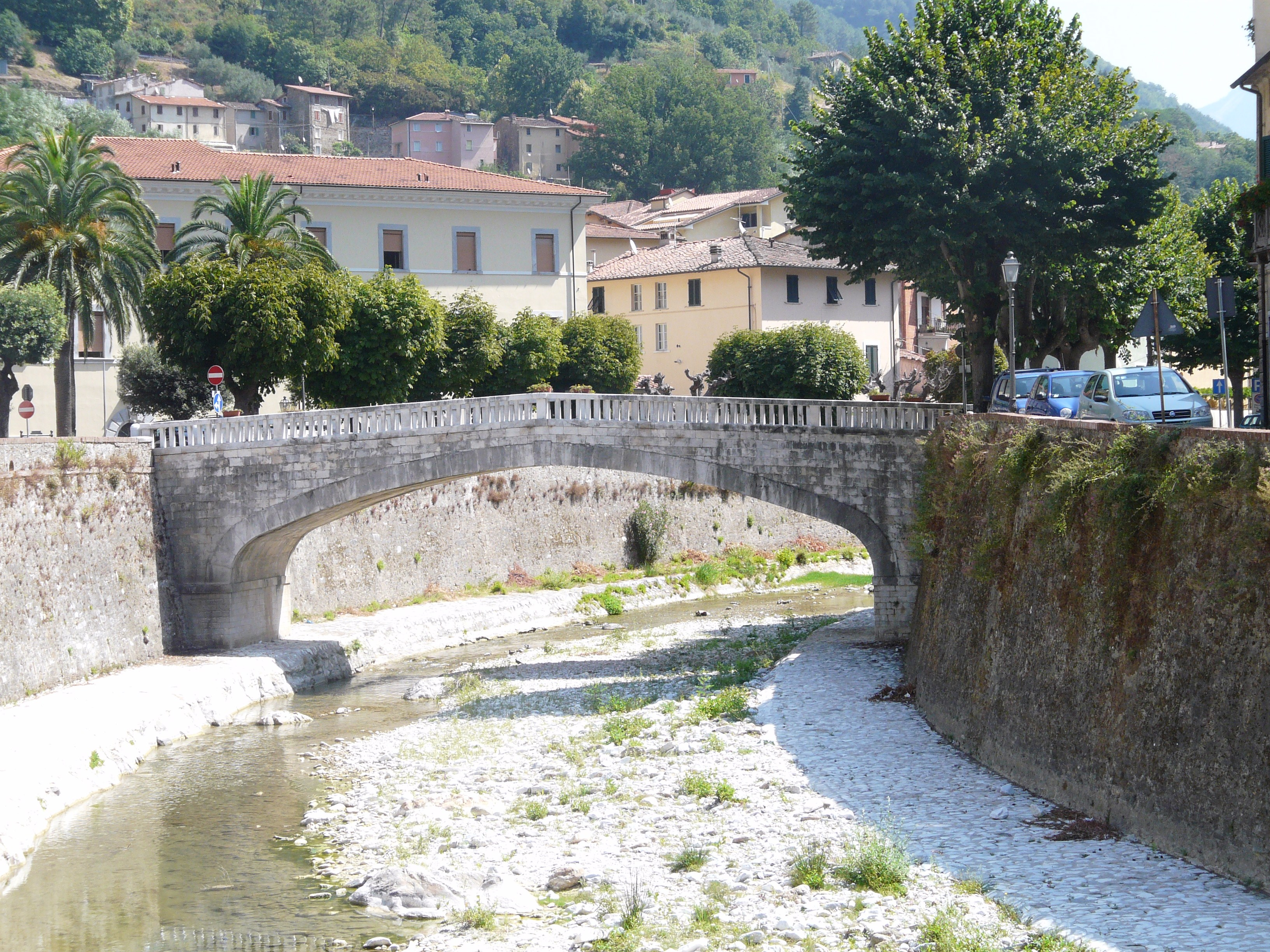 Ponte presso Seravezza, Toscana, Italia